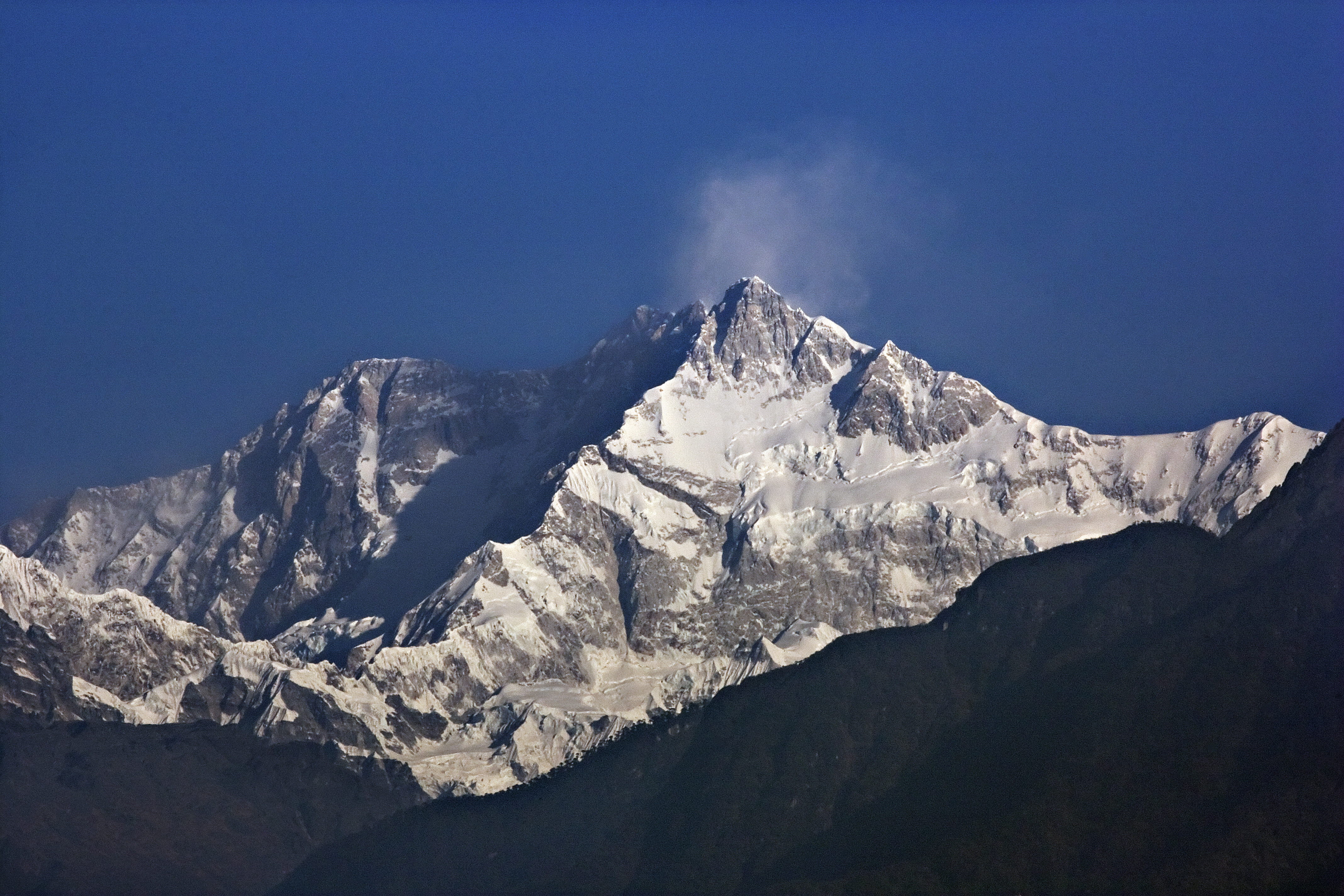 Kangchenjunga from Pelling, Sikkim, India